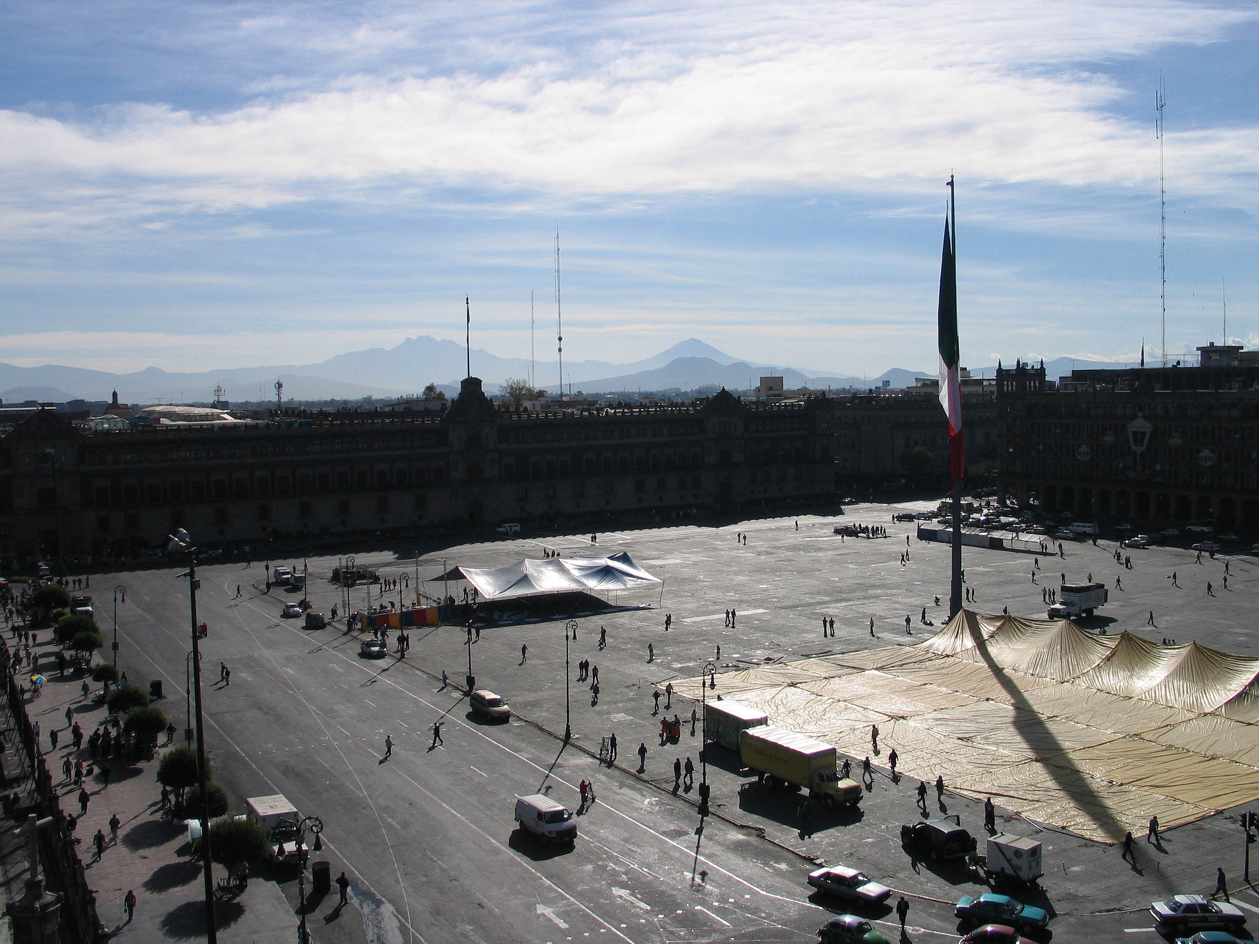 Zócalo, Mexico-Stadt mit Blick auf Popocatepetl und Iztacihuatl Photograph: Luidger (24. Dezember 2004)